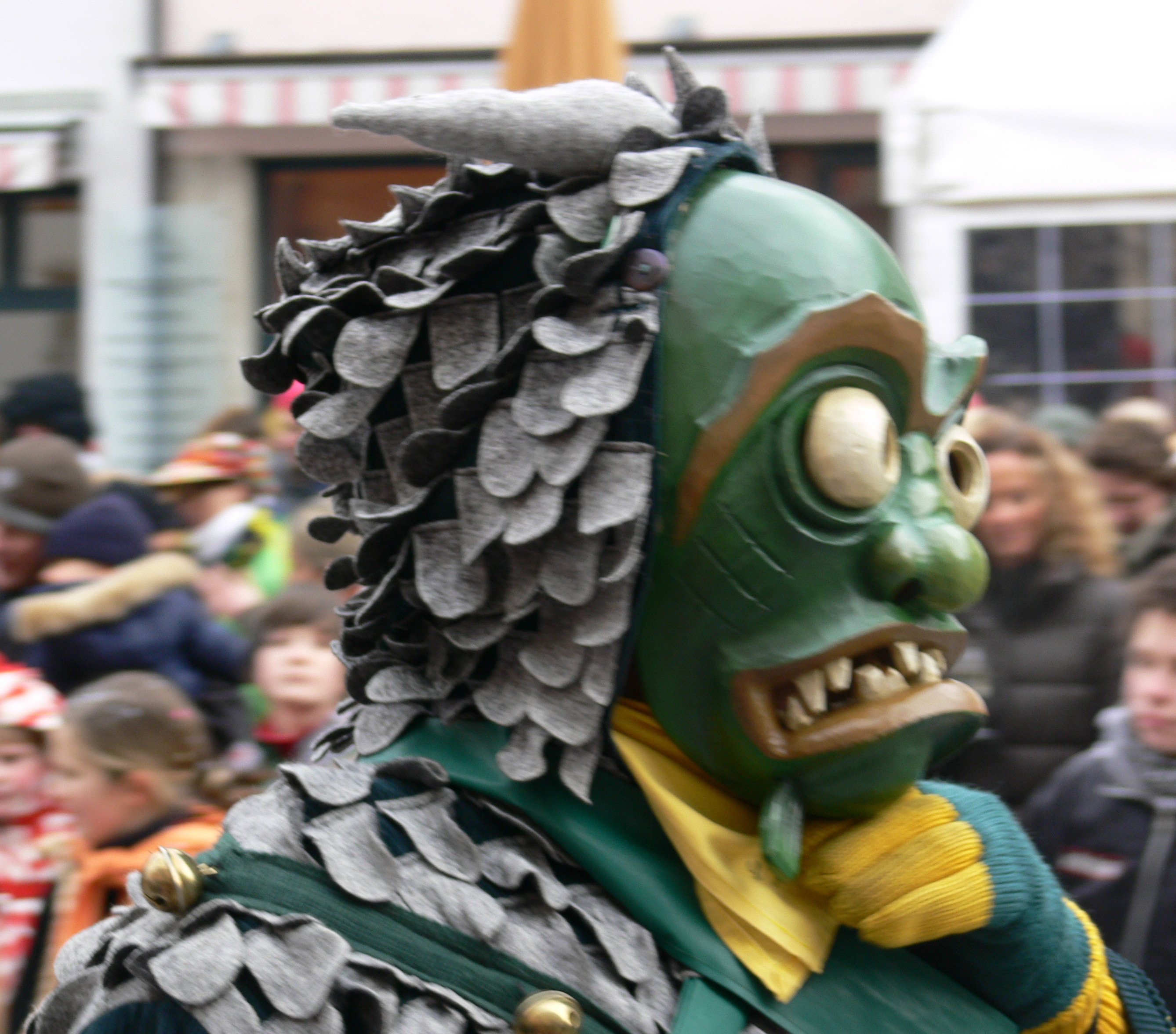 Narrensprung am Fasnetsmontag, 4. Februar 2008 in Ravensburg: Schussengeist der Narrenzunft d'Dammglonker, Langenargen